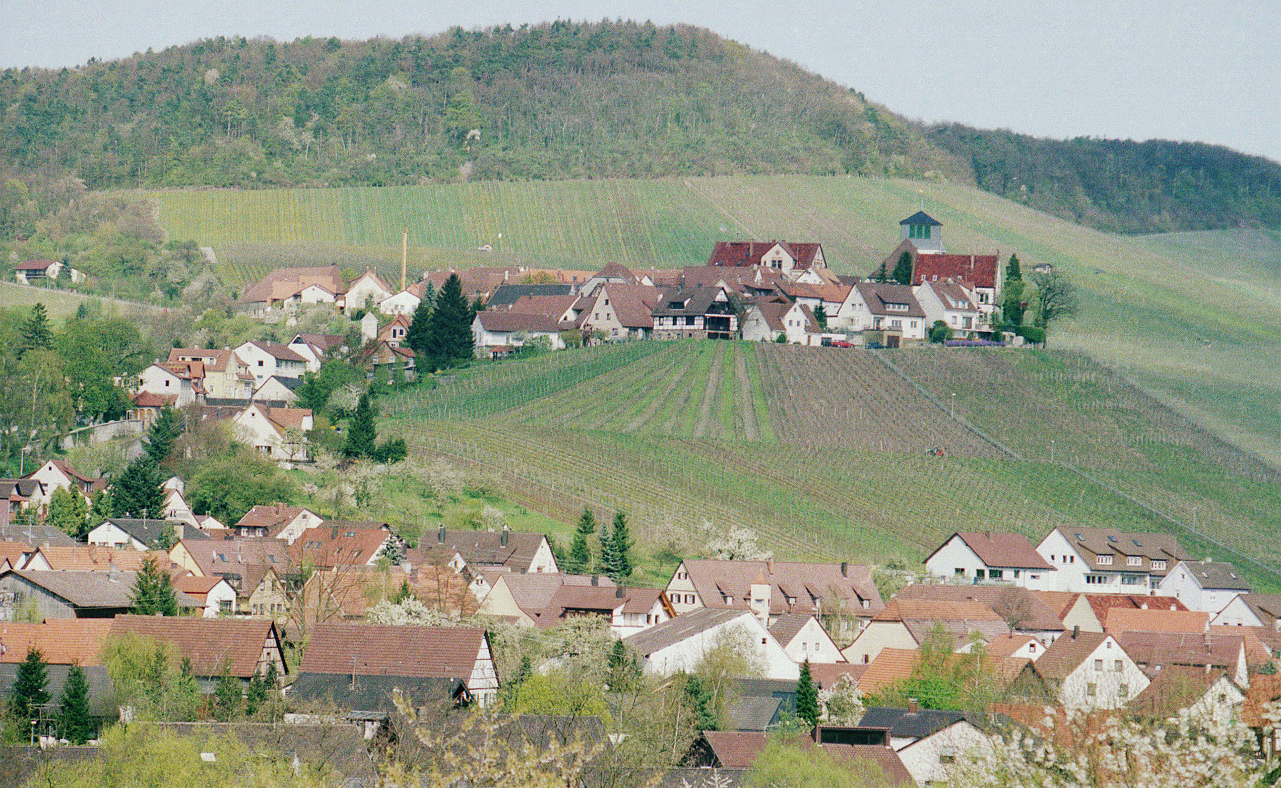 Haslach. Ortsteile Niederhaslach und Hohenhaslach.